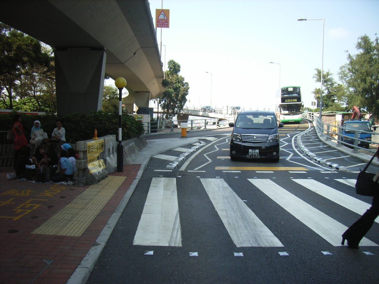 銅鑼灣行車天橋 User:Sun Victoria